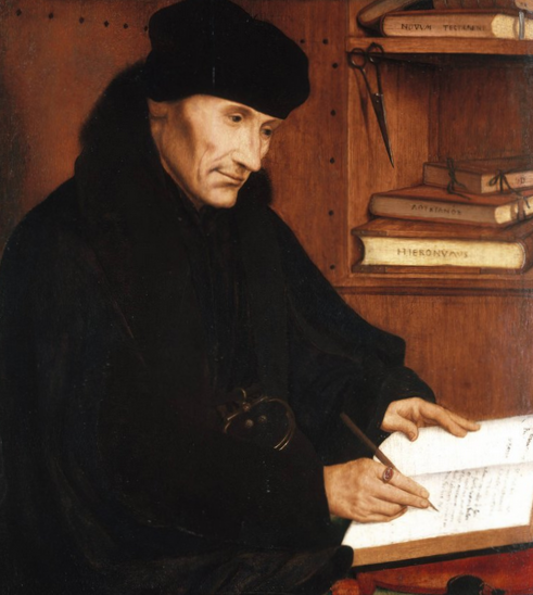 Der flämische Maler Quentin Massys malte in Antwerpen den niederländischen Humanisten in seinem Studierzimmer.